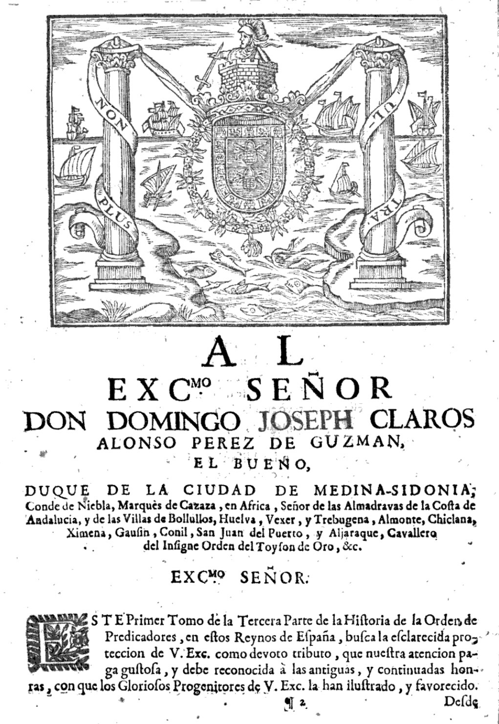 Dedicatoria al duque de Medina Sidonia en el libro Historia de la provincia de España de la Orden de los Predicadores, de Manuel Jose de Medrano.